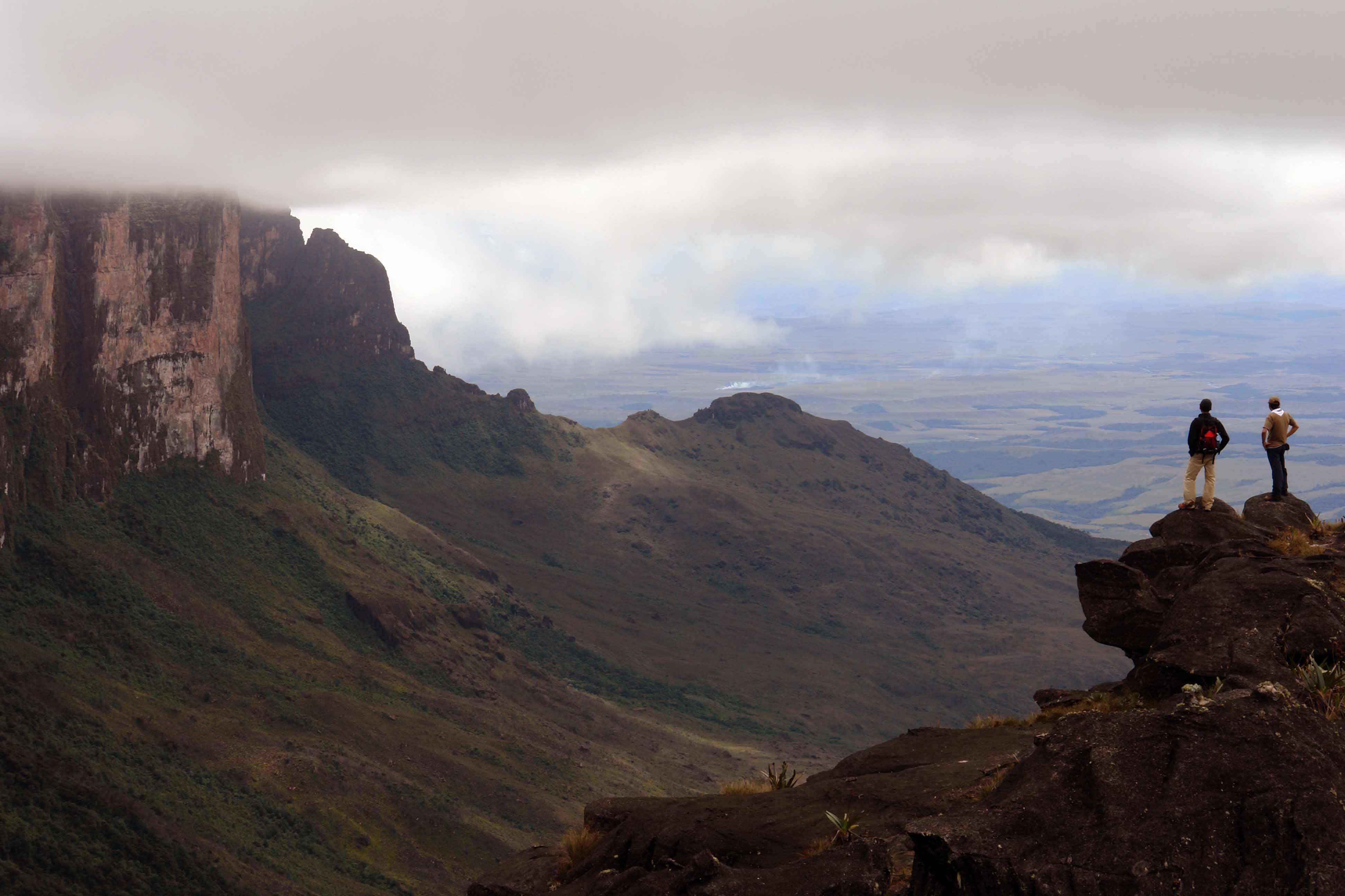 Horizonte visto do topo do Monte Roraima.